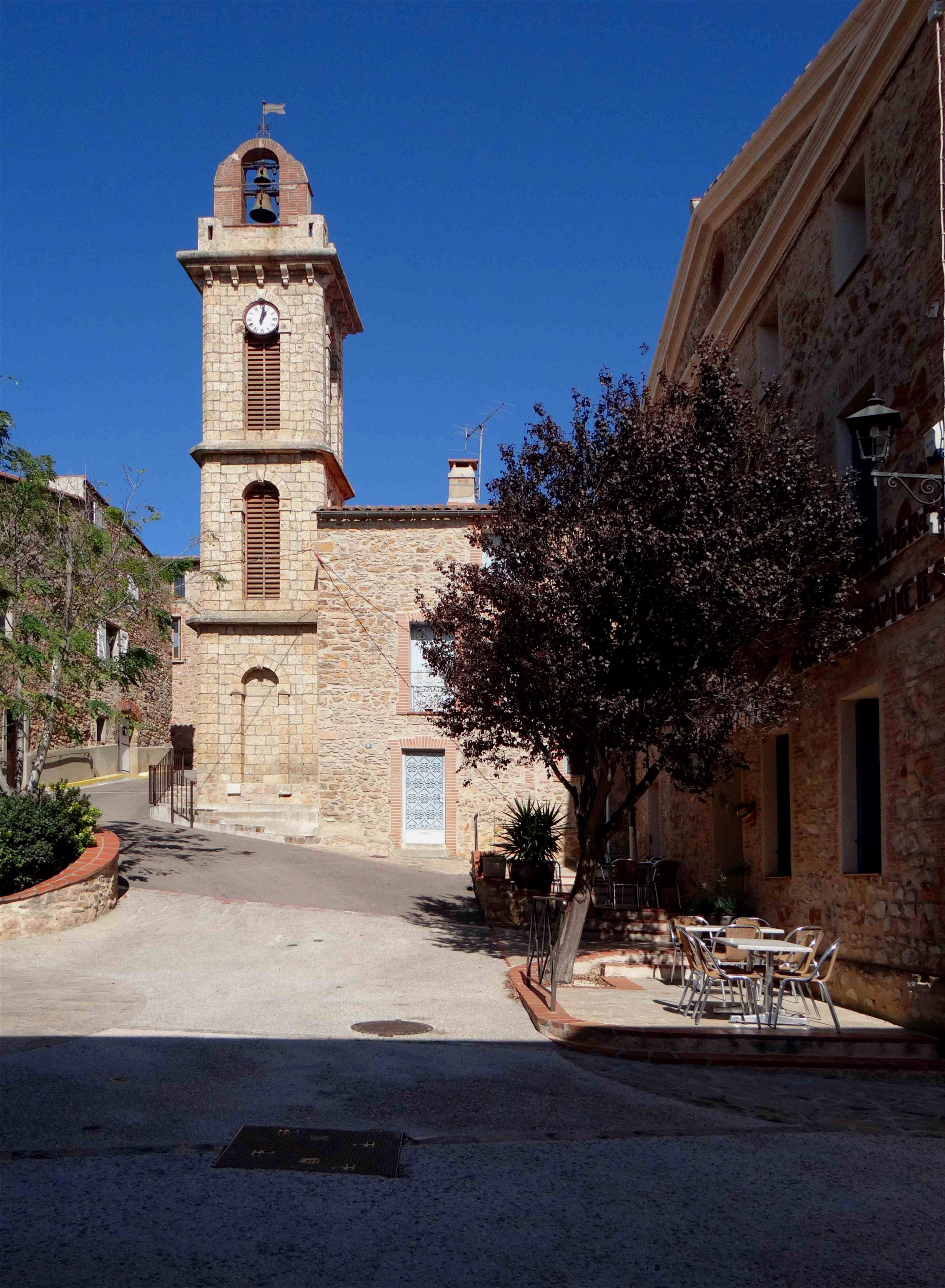 Clocher-tour de l'église paroissiale Saint-Paul, Calce, Pyrénées-Orientales.